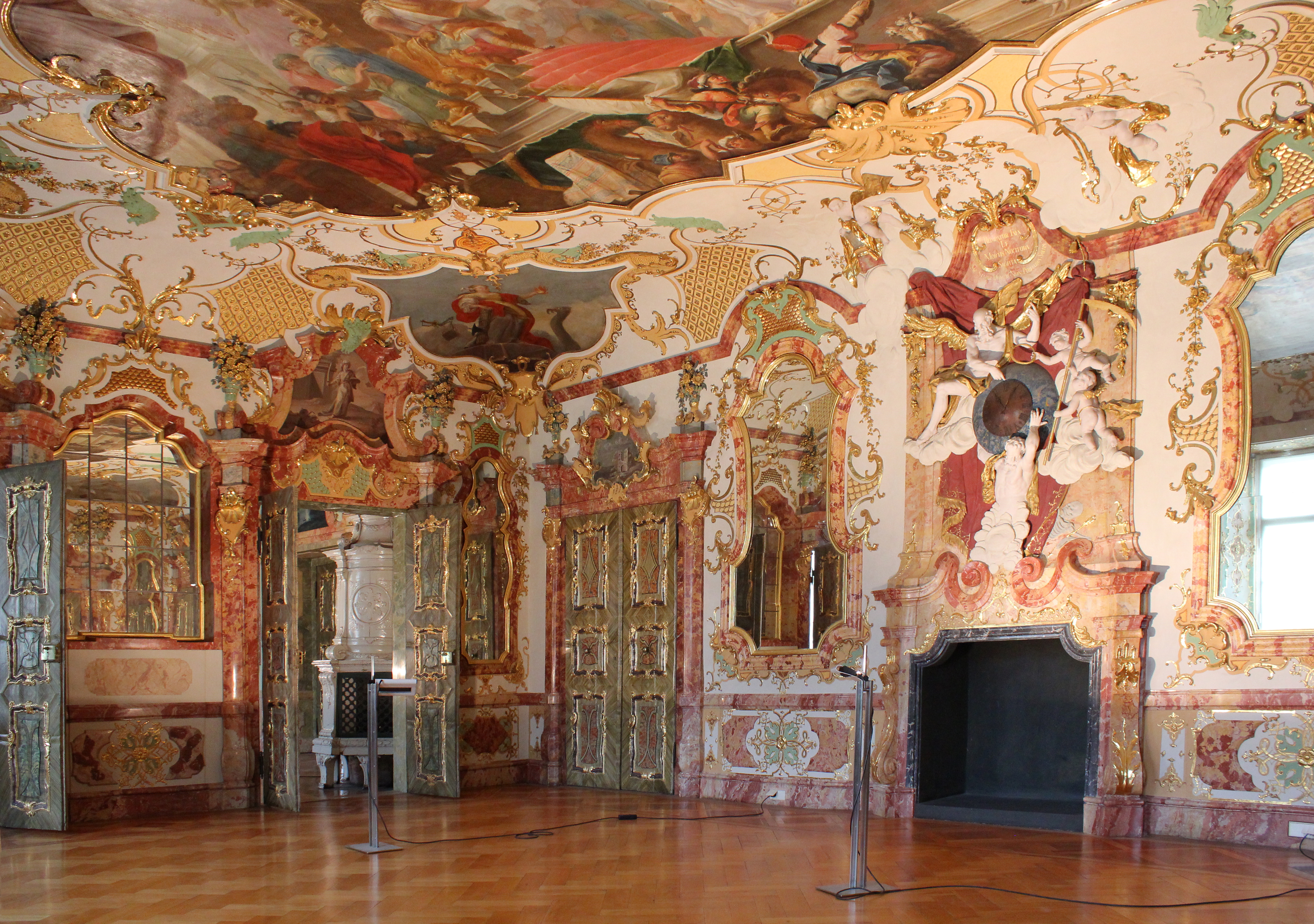 Residenz Kempten, näheres siehe Dateiname